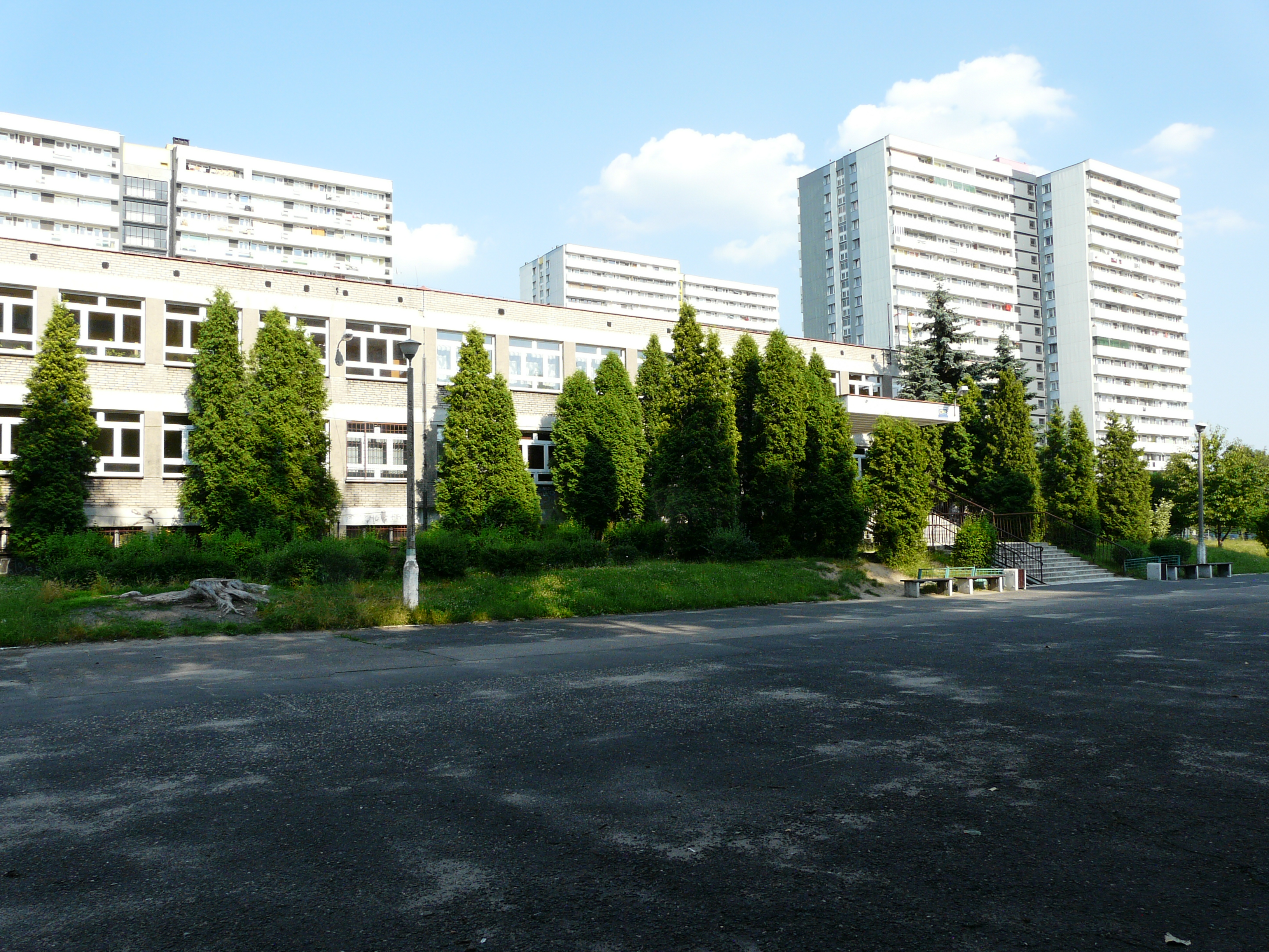 Szkoła Podstawowa nr 59 im. Jana Matejki w Katowicach